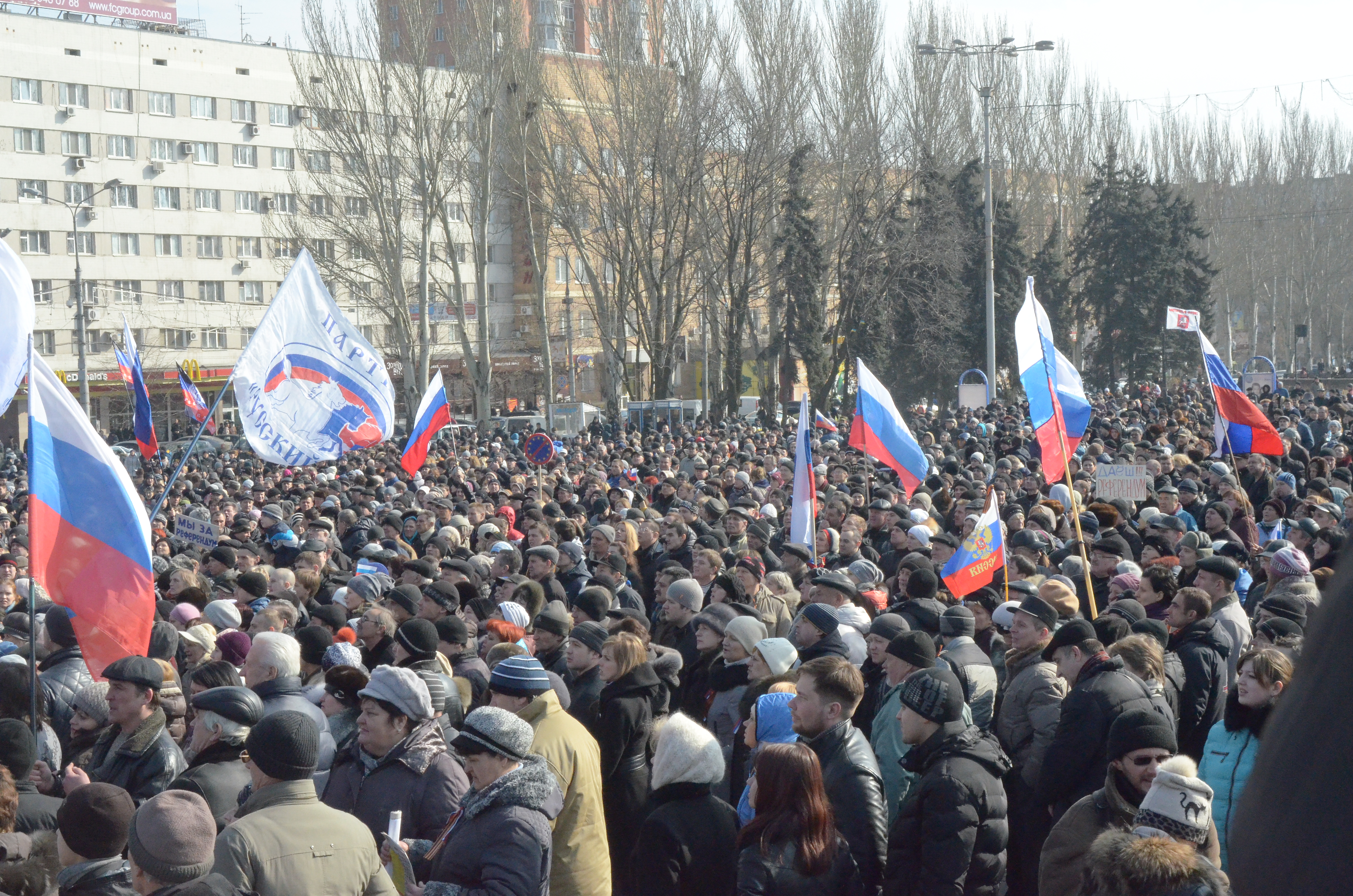 Протесты в Донецке